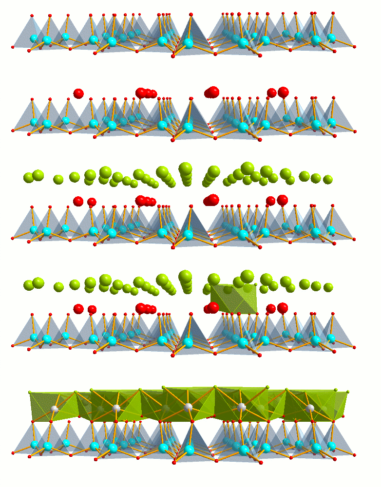 Strukturchemischer Aufbau von Chrysotile